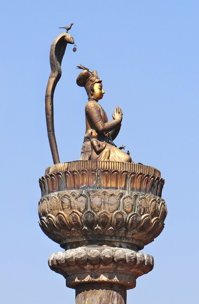 Statue du roi Yoganarendra Malla La statue en cuivre du roi Yoganarendra Malla, écrit aussi Yog Narendra Malla, (1667-1705) se dresse au sommet d'une colonne de pierre datant de 1692. Elle est à proximité du temple Jwala Narsingh. Le roi, qui est à genoux face à son palais, est protégé par un cobra sur la tête duquel est posé un oiseau. Des légendes sont attachées à ces symboles. A coté de lui, se trouve une petite statue qui représente son fils le Prince Siddhi Narsingh Malla II qui s'est révolté contre son père pour monter sur le trône.